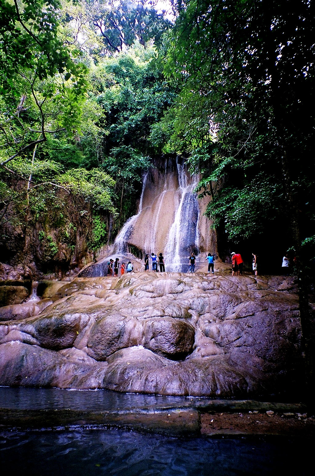 Sai Yok Noi Waterfall in Sai Yok National Park, Kanchanaburi, Thailand